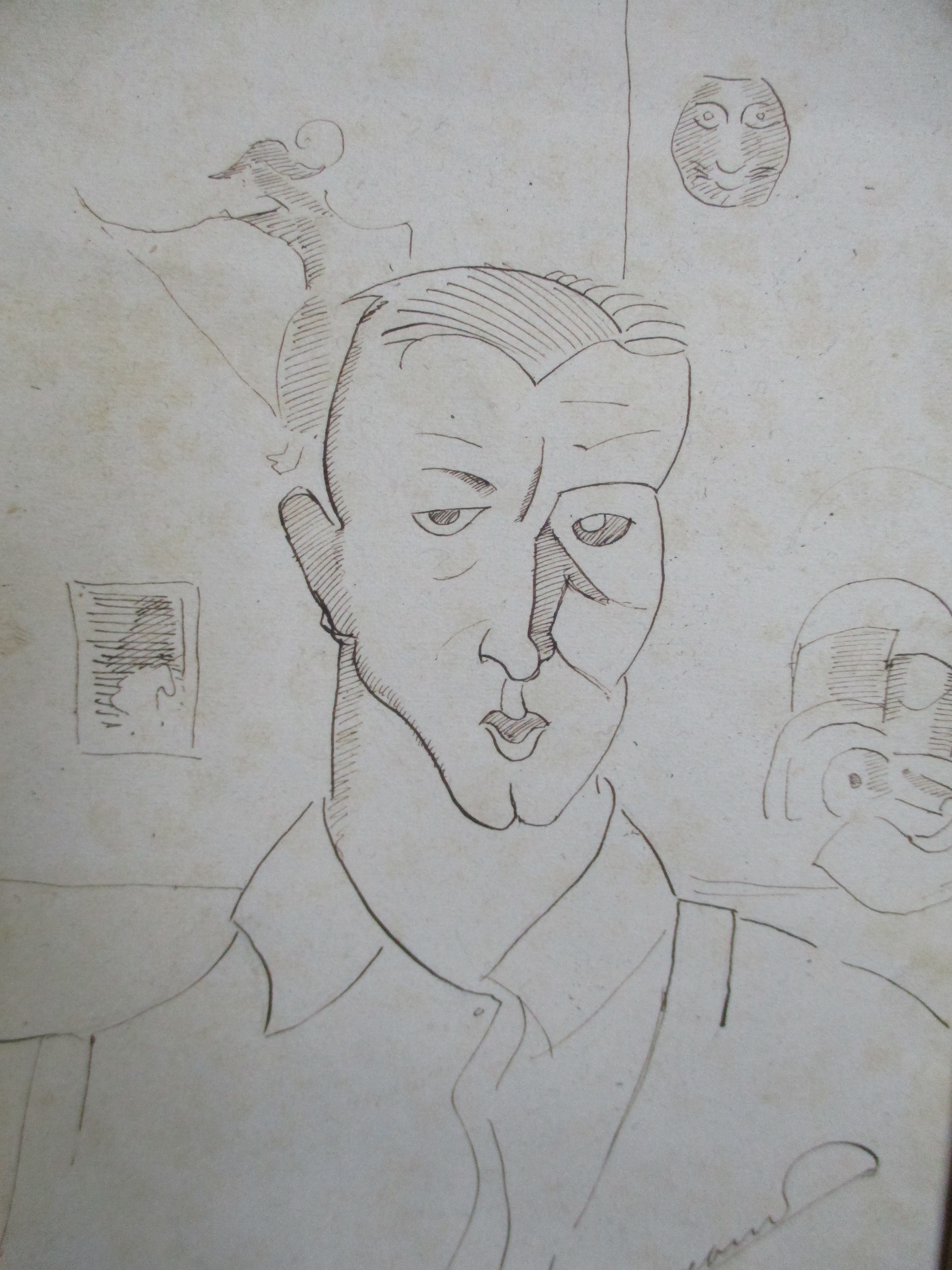 Zelfportret van Siem van den Hoonaard (1930-1938)